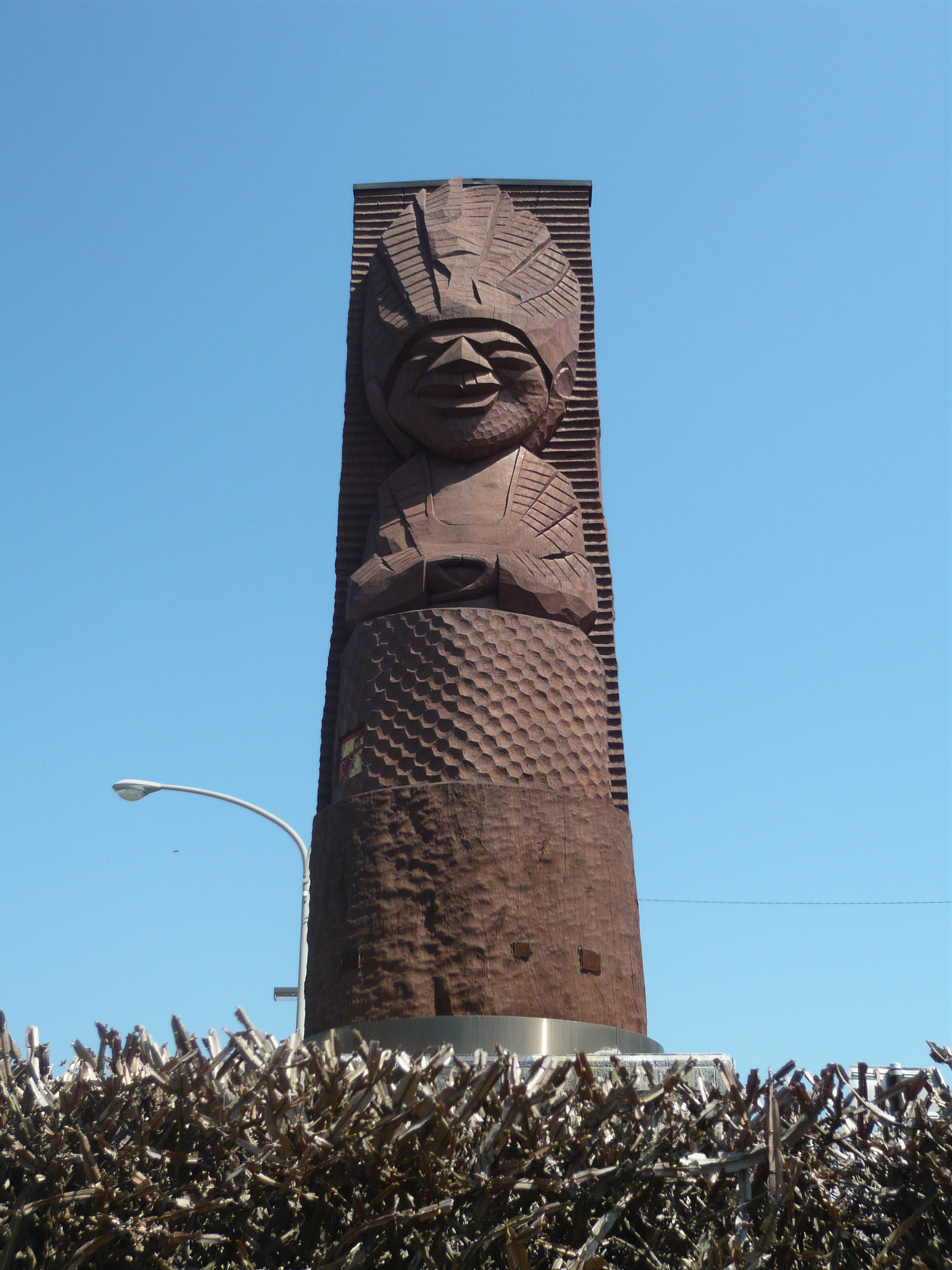 Gifu Hashima Station（岐阜羽島駅）,Hashima,Gifu,Japan（岐阜県羽島市）で撮影。駅前にある円空の一刀彫のモニュメント